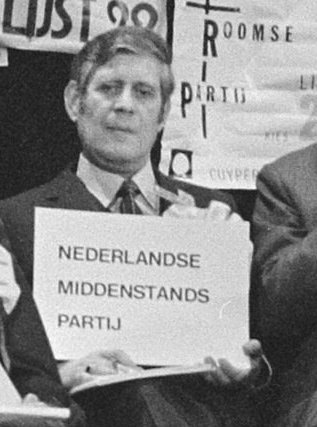 Collectie / Archief : Fotocollectie Anefo Reportage / Serie : Televisie-uitzending van de AVRO met 27 lijsttrekkers in Bellevue te Amsterdam Beschrijving : Presentator Wibo van de Linde (l) met "kleine" lijsttrekkers op de stoelen Datum : 27 april 1971 Locatie : Amsterdam, Noord-Holland Trefwoorden : lijsttrekkers, politieke partijen, televisieprogramma's, verkiezingen Persoonsnaam : Linde, Wibo van de Instellingsnaam : Bellevue Fotograaf : Fotograaf Onbekend / Anefo Auteursrechthebbende : Nationaal Archief Materiaalsoort : Negatief (zwart/wit) Nummer archiefinventaris : bekijk toegang 2.24.01.05 Bestanddeelnummer : 924-4954